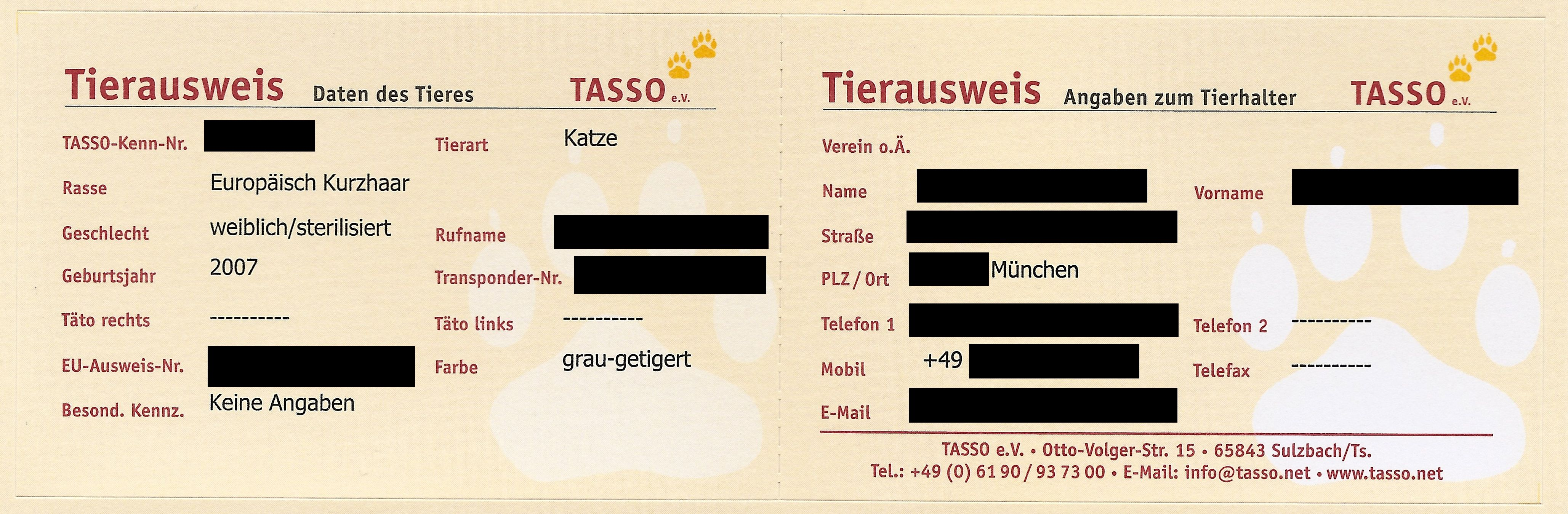 Tierausweis (Doppelseite zum Zusammenkleben), ausgestellt von Tasso e.V.